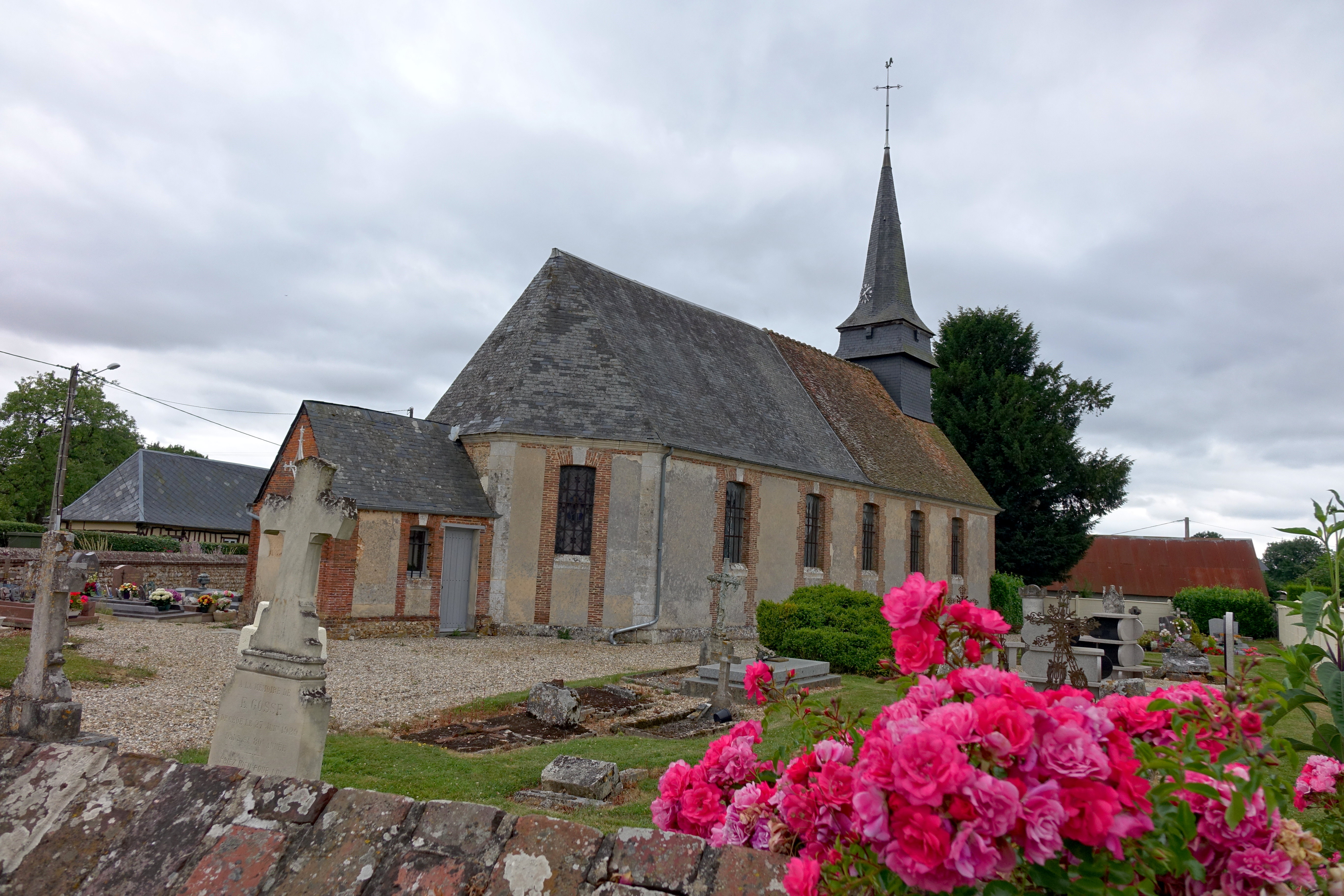 Église de Saint-Paul-de-Fourques, Eure, France